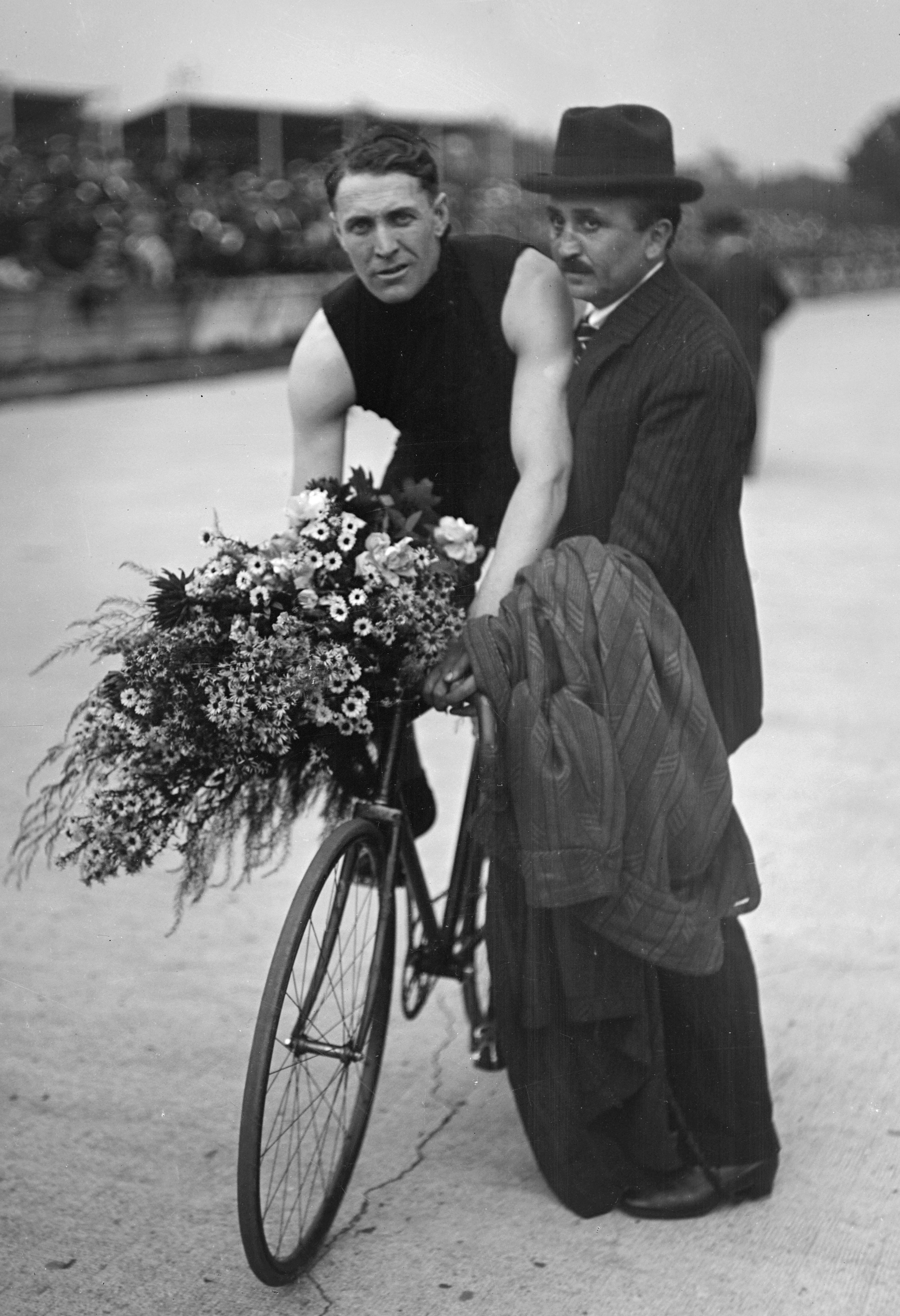 Parc des Princes, 26/9/20, William Bailey gagnant du Grand Prix de l'U.V.F. [Union Vélocipédique de France].